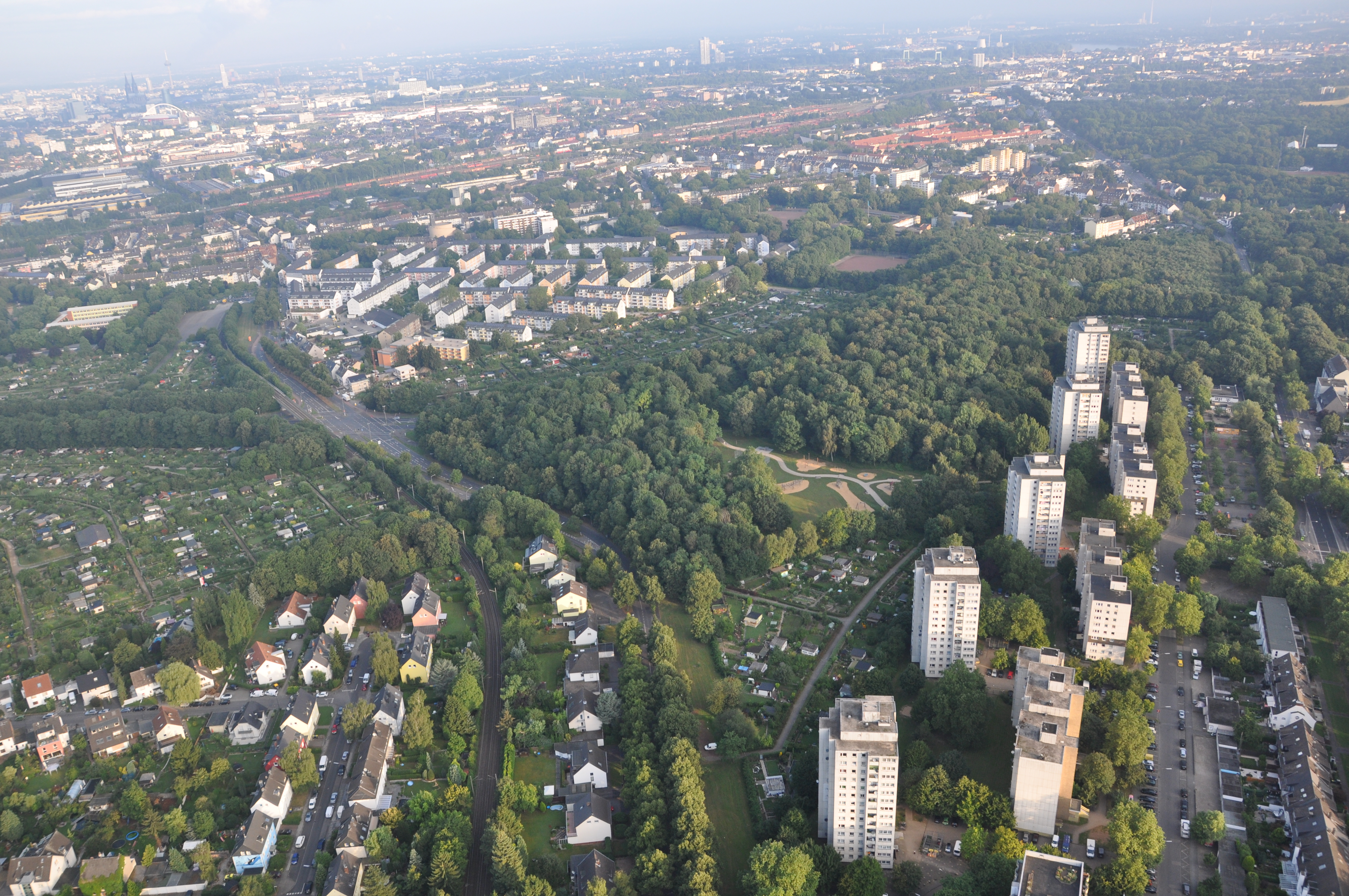 Ballonfahrt Köln. Blick von Ostheim über den Vingster Berg nach Vingst.